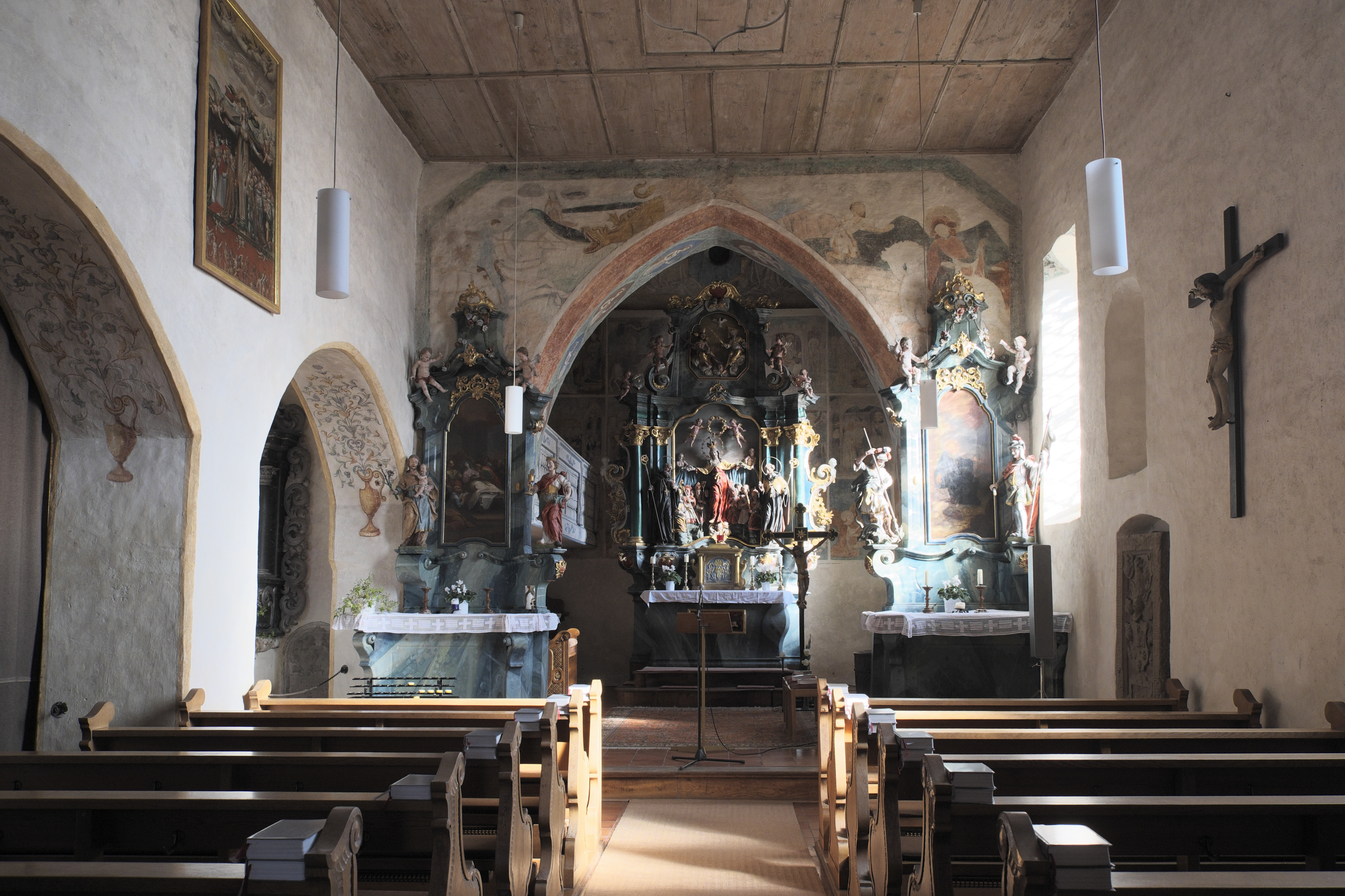 Friedhofskirche, ehemalige Pfarrkirche, St. Gallus in Mühlheim an der Donau im Landkreis Tuttlingen (Baden-Württemberg/Deutschland), Innenraum